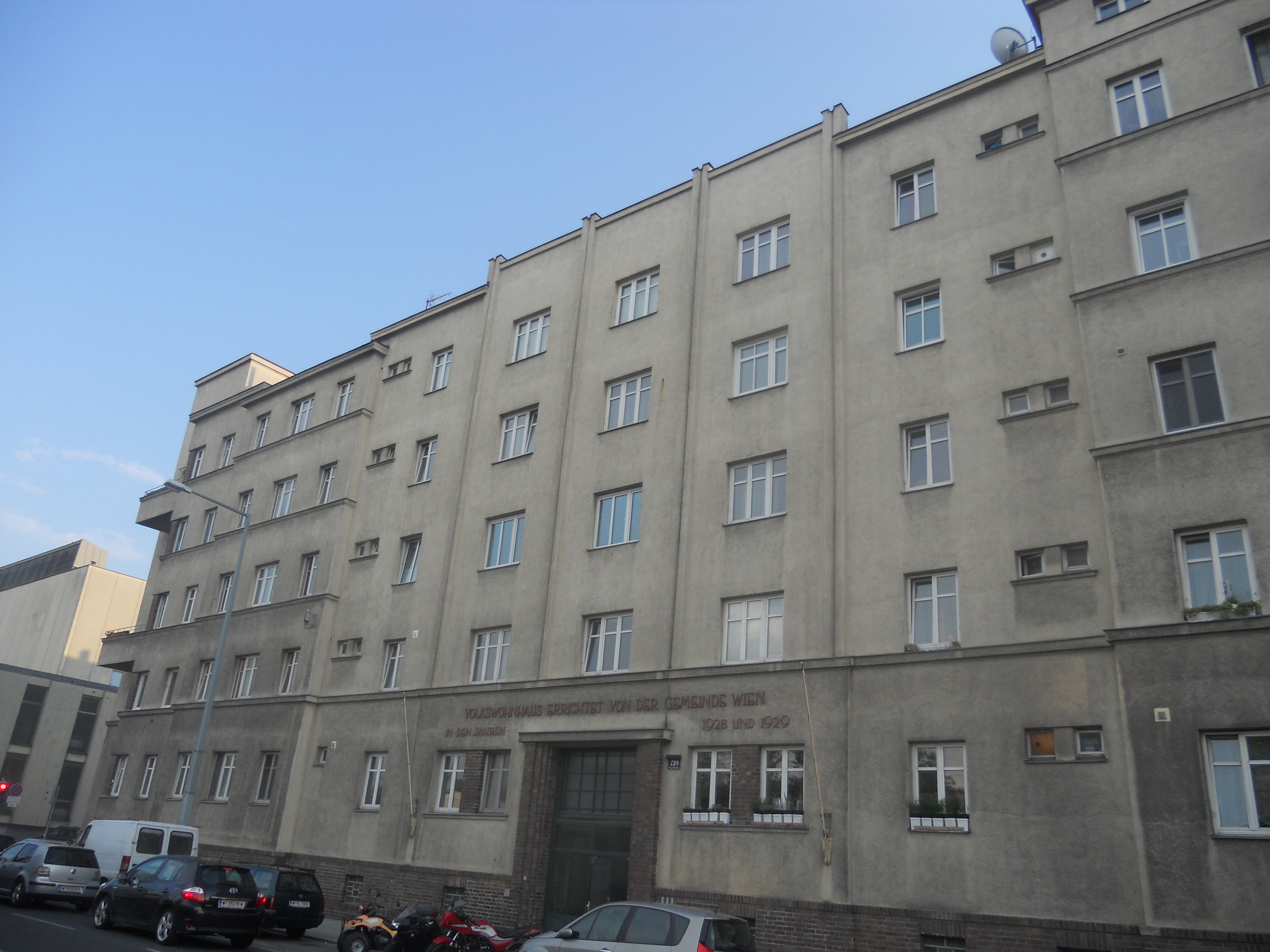 Haus Handelskai 210